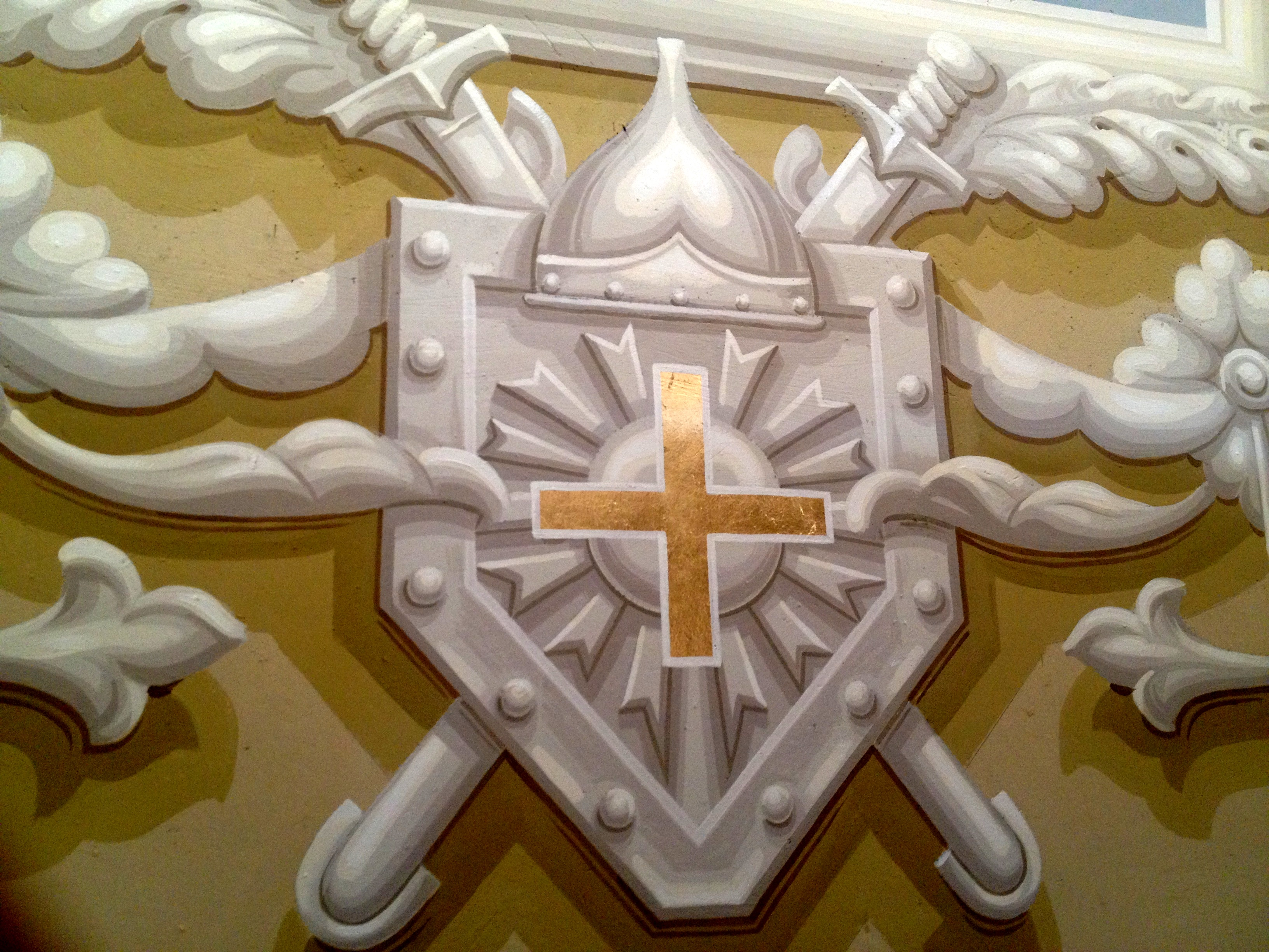 Фрагмент восстановленной внутренней росписи в Храме-памятнике воинам, павшим при взятии Казани в 1552 году(Храме-памятнике в честь Нерукотворенного Образа Спасителя) (г. Казань).